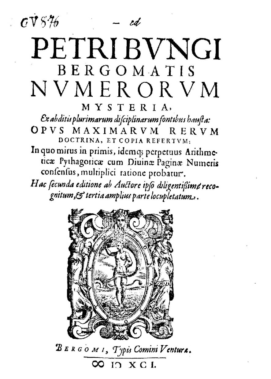 Frontespizio